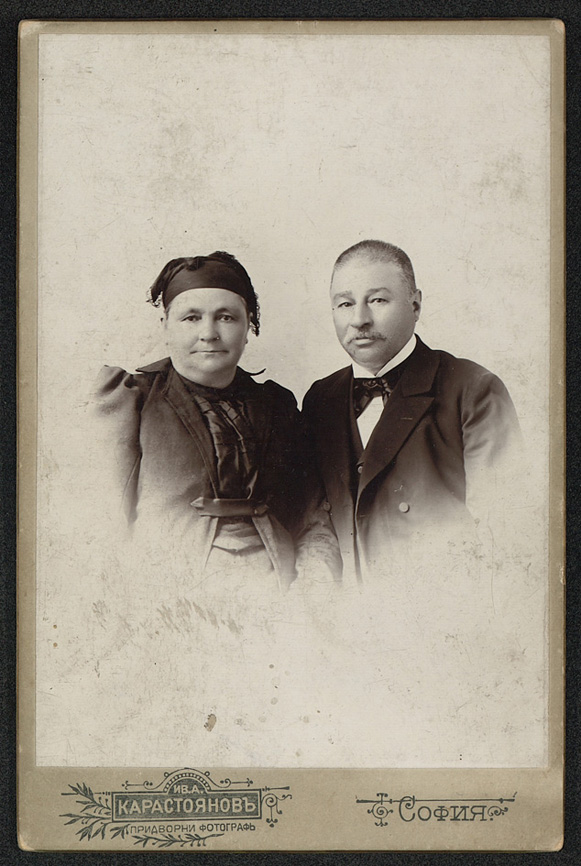 Сирма и Петър Сарафови